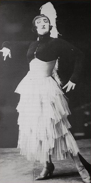 Танцовщица и путана Кариатис, Элизабет Тулемон - в роли Прекрасной Истерички (балет Эрика Сати, в котором она исполняла главную и единственную роль и была заказчикком этого произведения) Фото 14 июня 1921 года театр Колизей